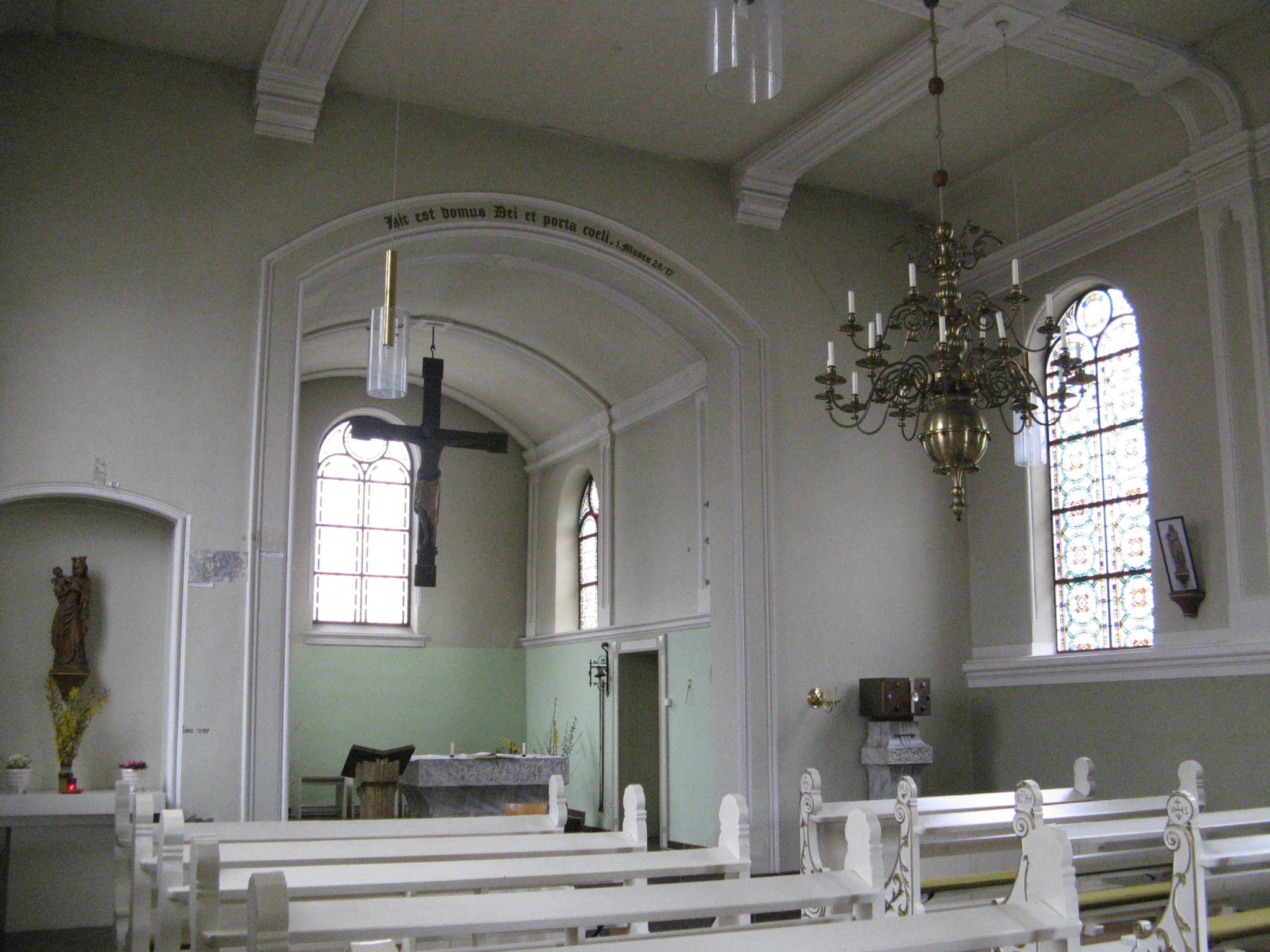 catholic saint knud church in Friedrichstadt Author: Dirk Ingo Franke